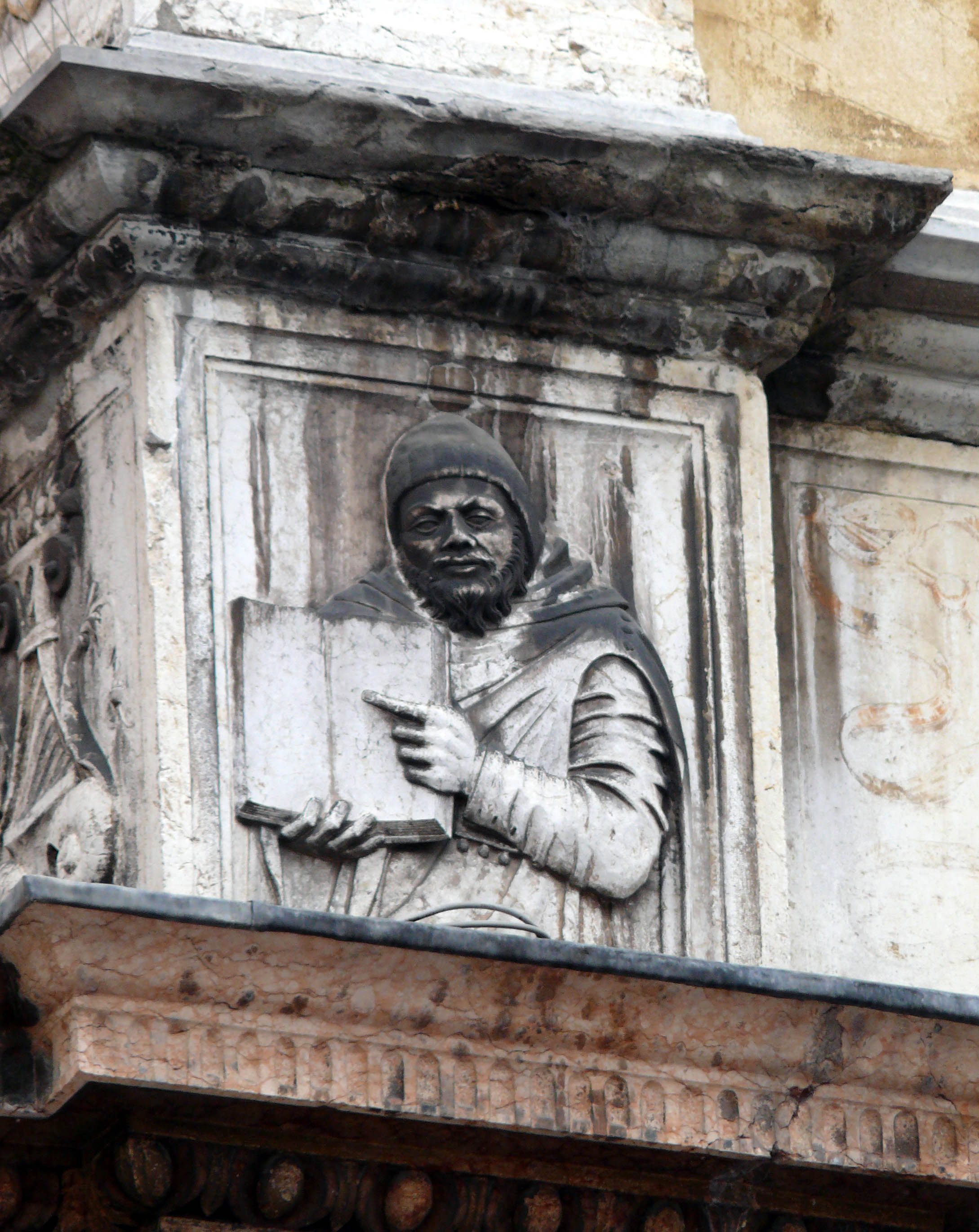 Fra Giocondo - effige (ritenuta) dell'architetto sita sulla facciata della Loggia del Consiglio a Verona